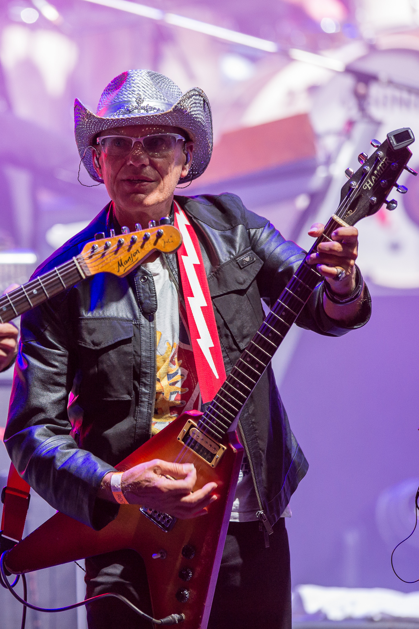 ARGO-Konzerte,City,Frankenhalle,Fritz Puppel,Konzert,Livekonzert,Livemusik,Musik,Rock Legenden 2016